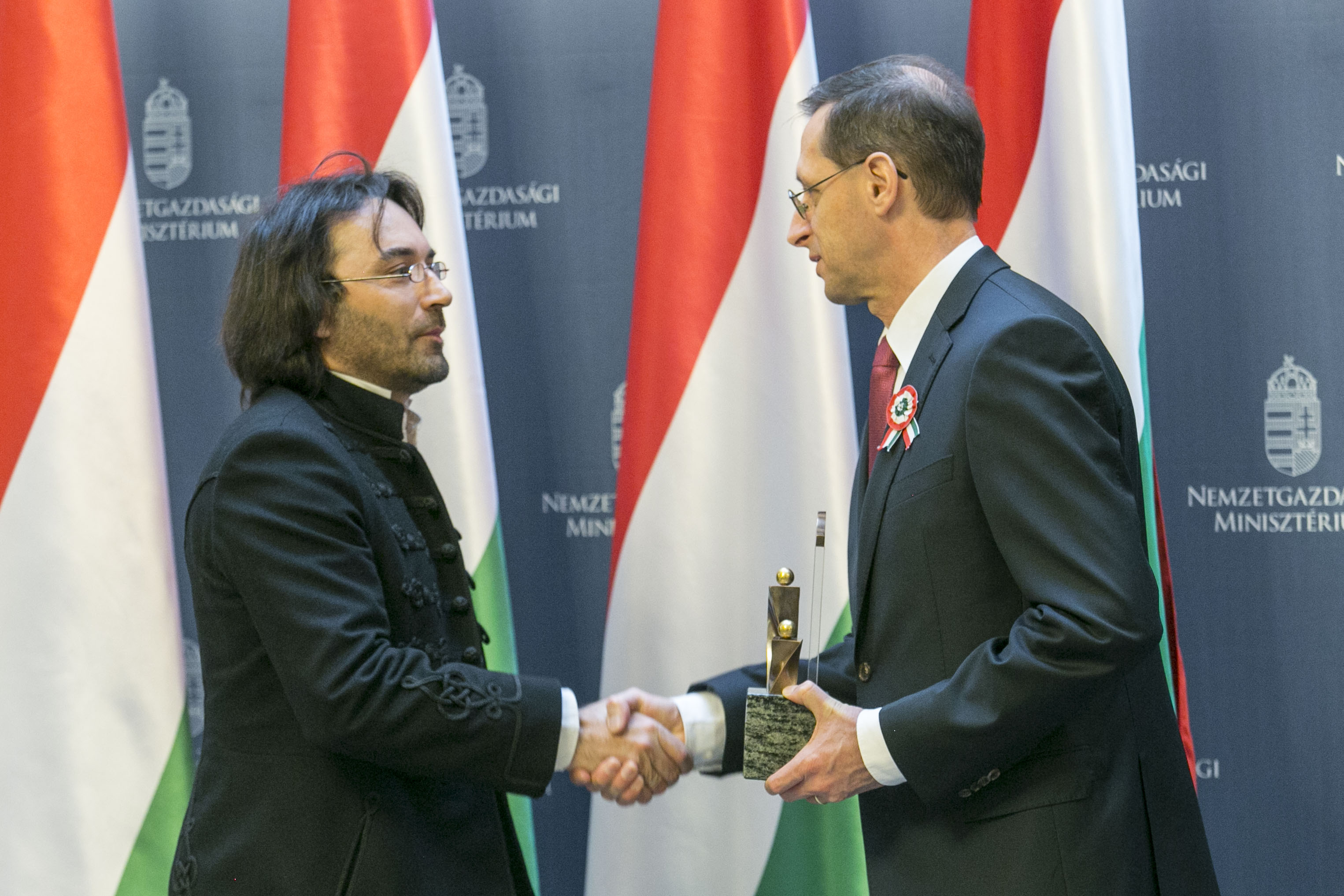 A hónap kis- és középvállalkozás, 2017 január díj átadása.